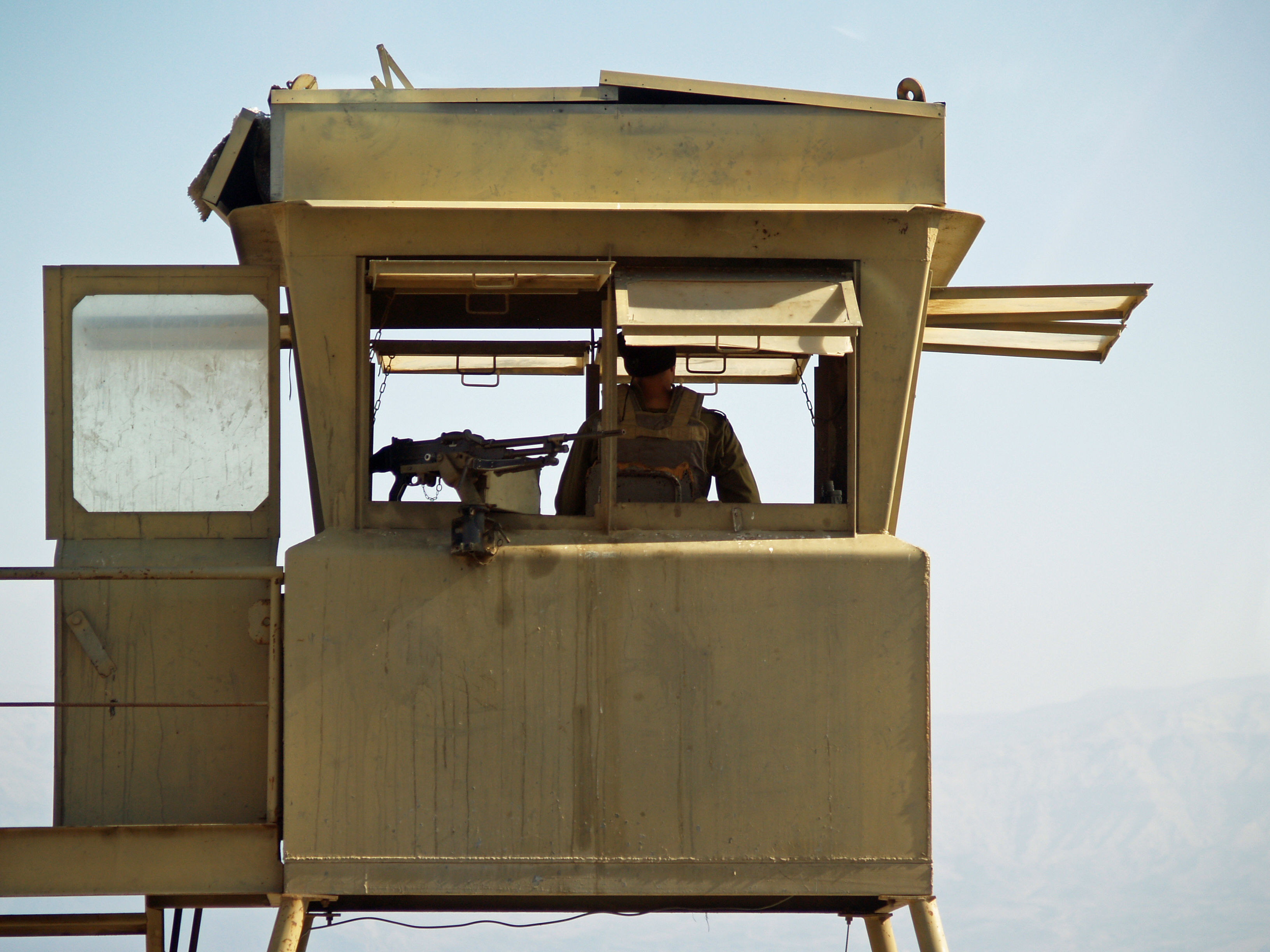 West Bank checkpoint